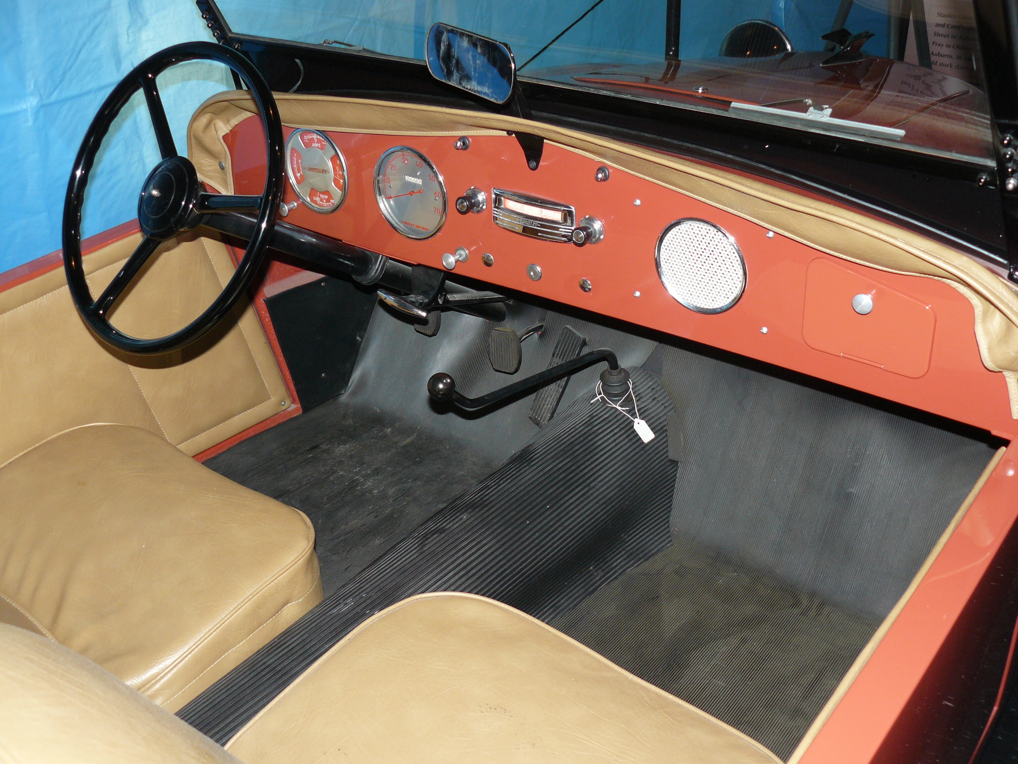 Auburn 2013